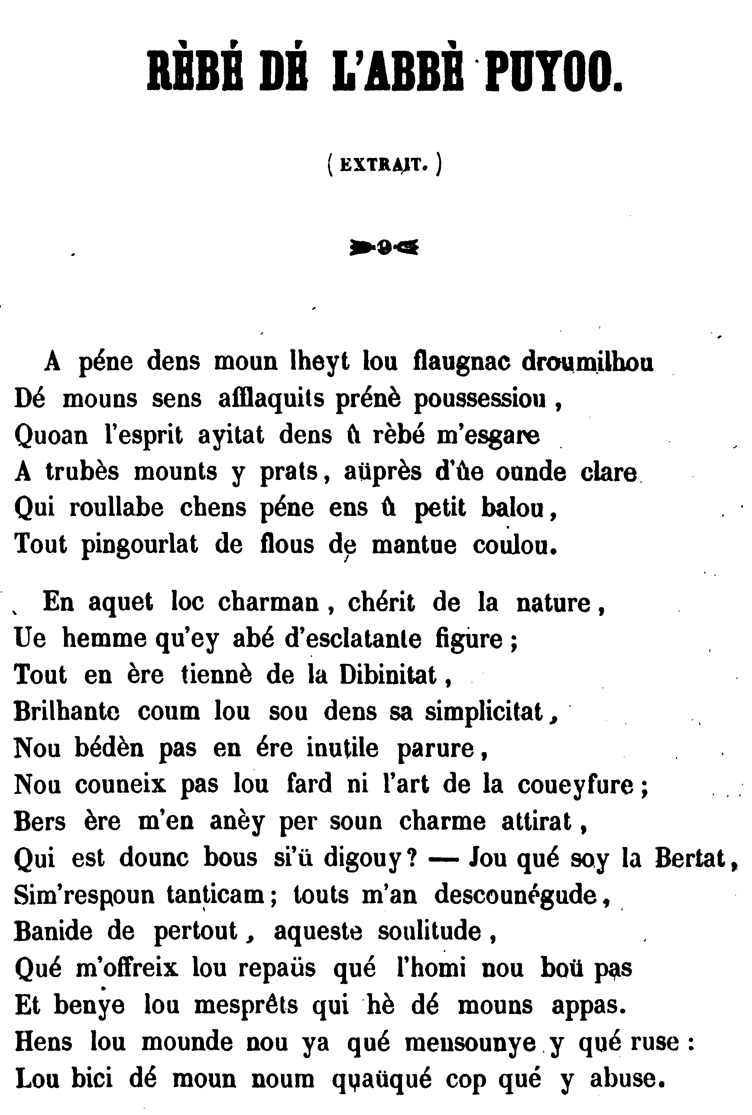 extrait du Reve de l'abbé Puyoo (XVIIIe) edite par Vignacour a Pau, 1860